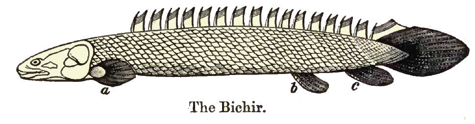 Polypterus